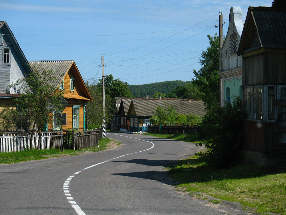 Беларуская (тарашкевіца): Моўчадзь